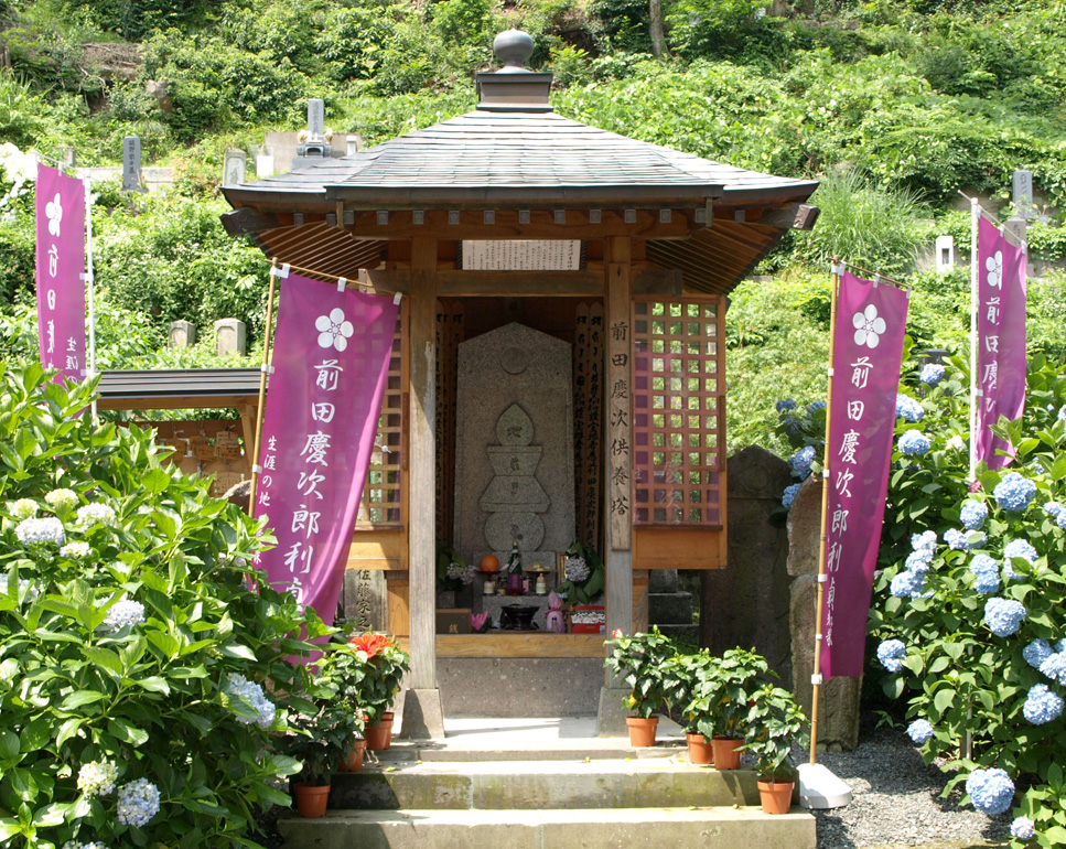 前田慶次供養塔(山形県米沢市 堂森善光寺)